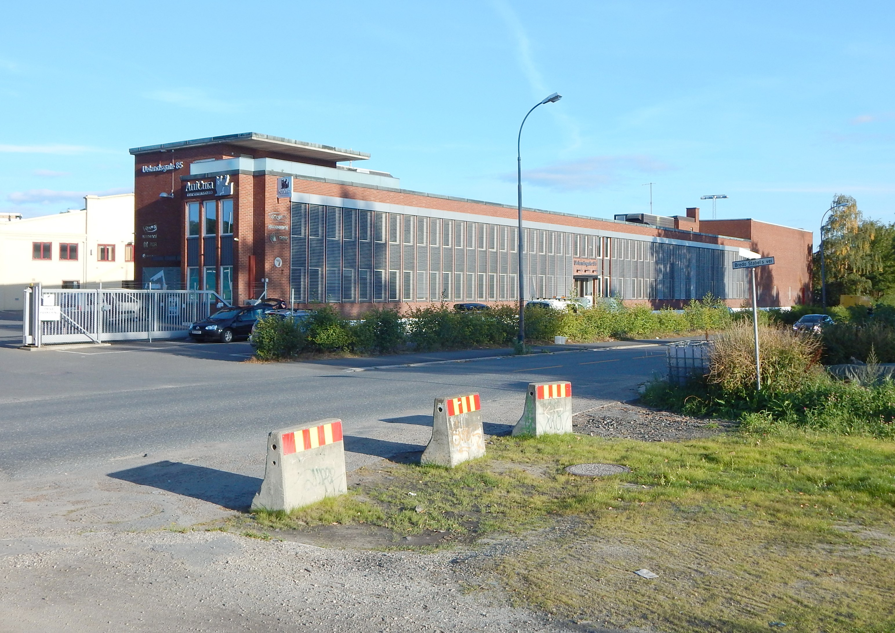 Bredo Stabells vei har ikke gjennomkjøring til Uelands gate.